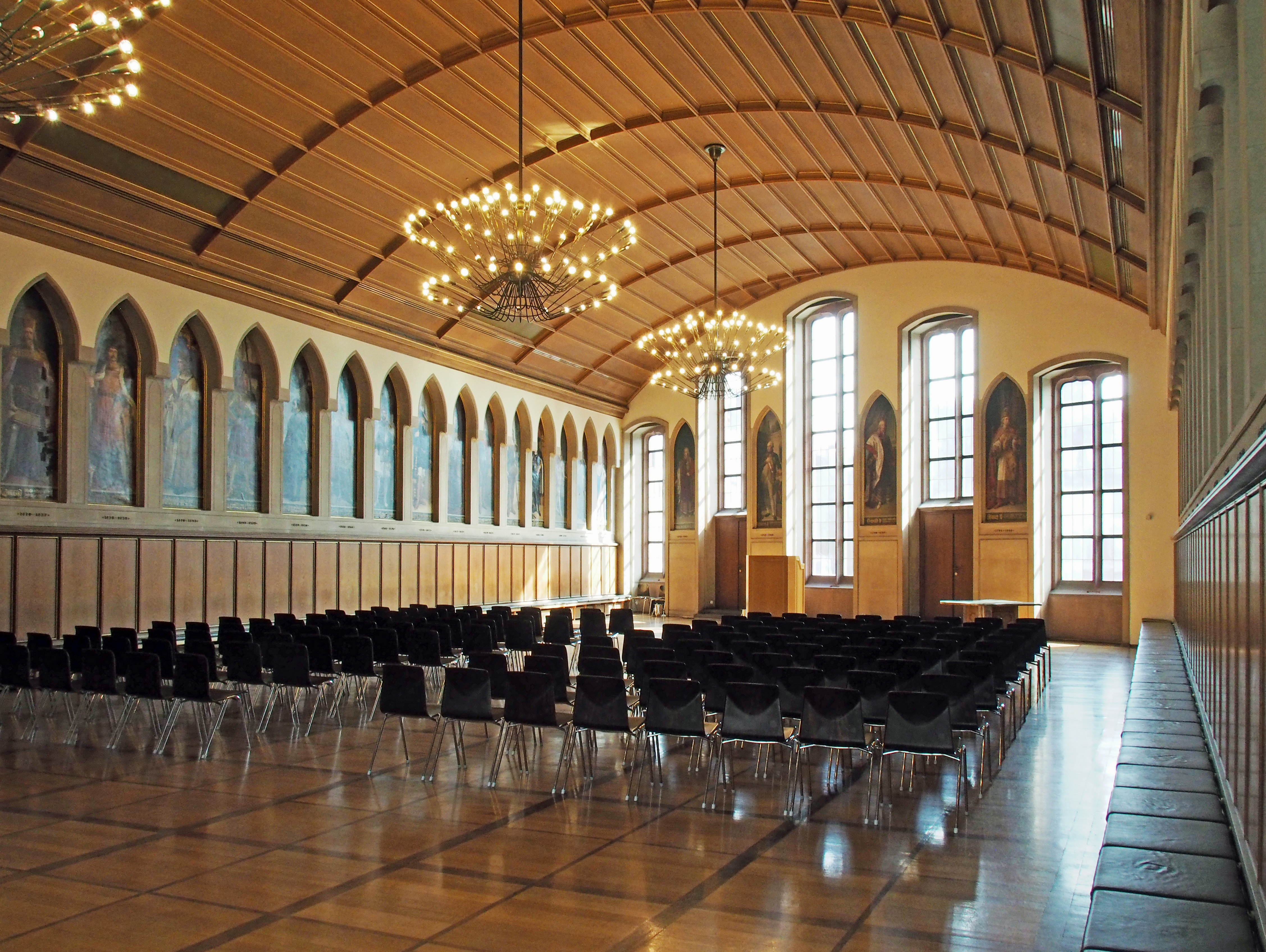 Kaisersaal im „Haus zum Römer“ (Rathaus), Frankfurt am Main